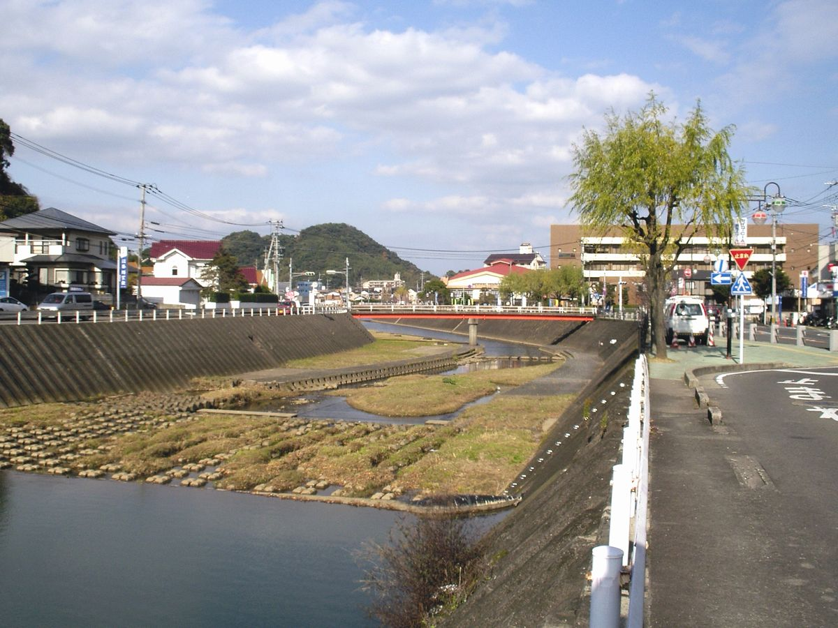 長与川下流部。右岸の茶色のビルは長与町役場